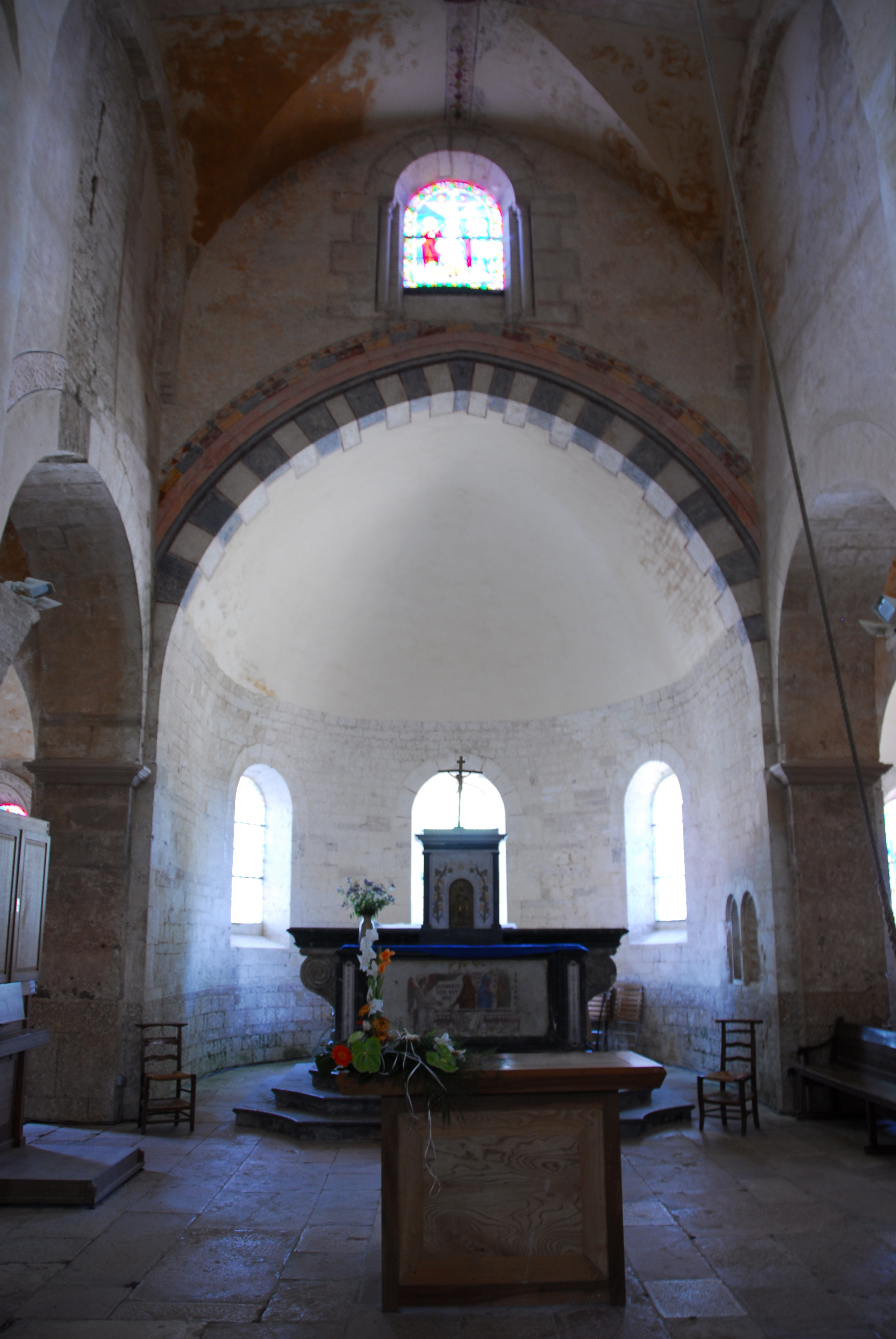 St-Martin_de_Chapaize, Chor aus Vierung